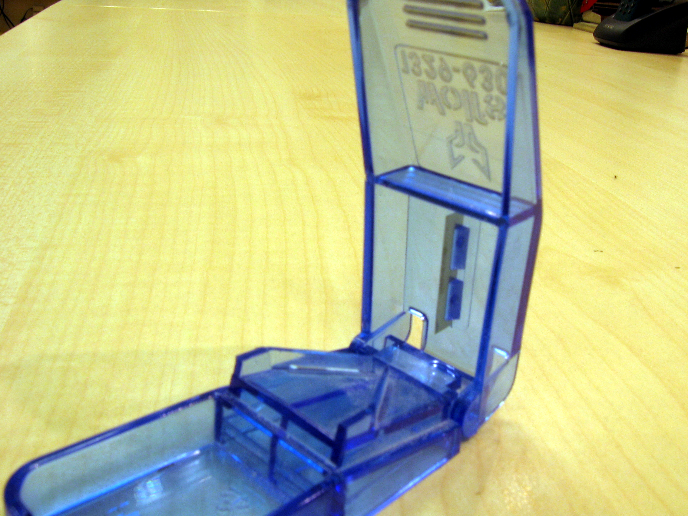 A pill splitter.